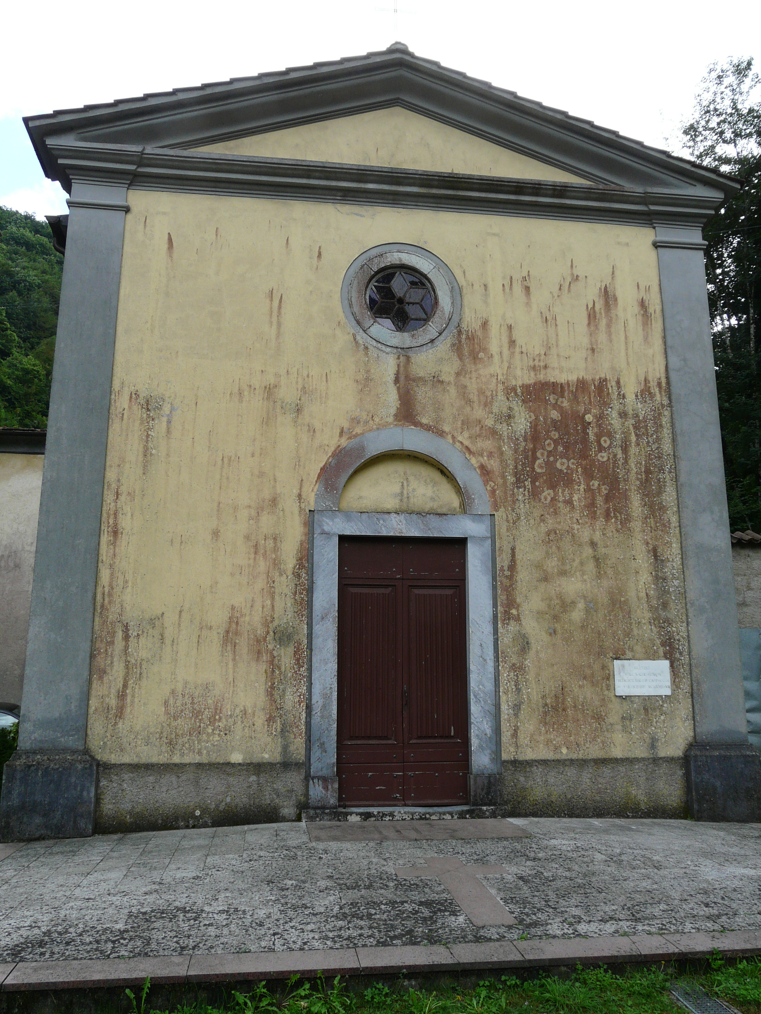 Chiesa di Mulina, Stazzema, Toscana, Italia